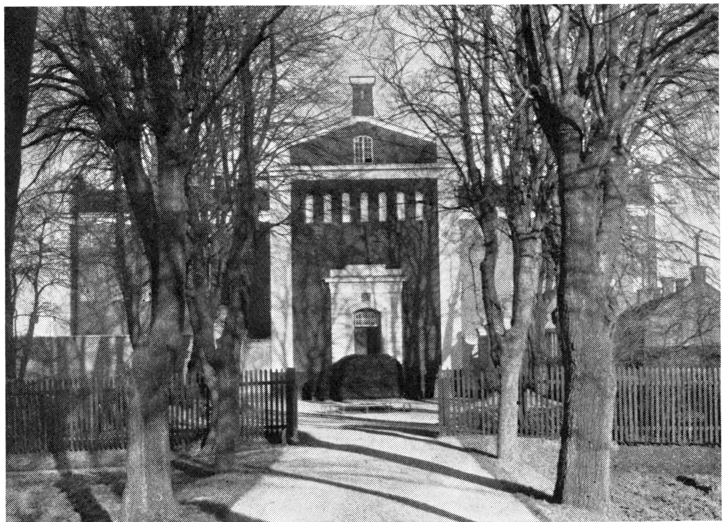 Länsfängelset i Kristianstad